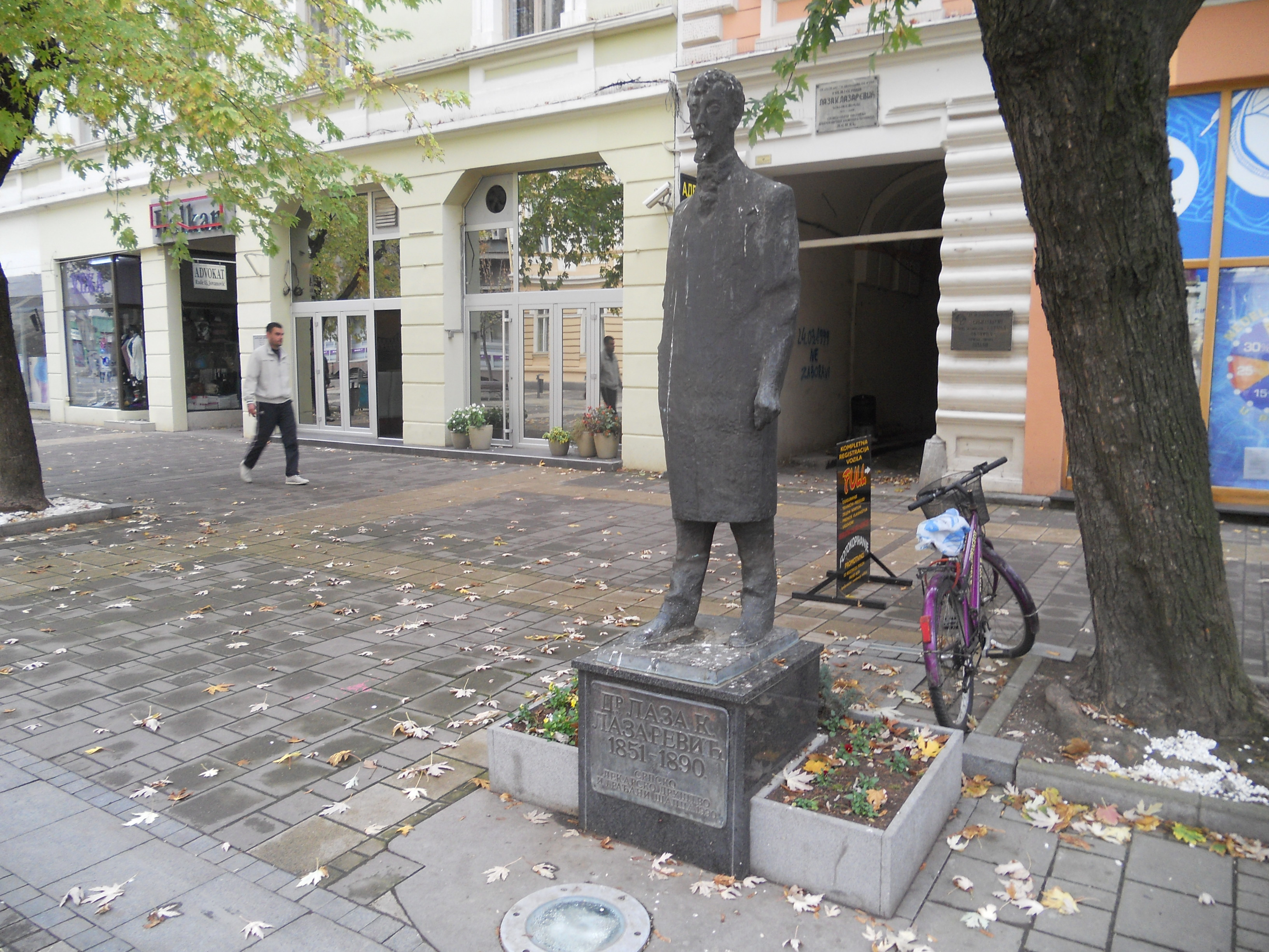 аутор Дарко Гајић